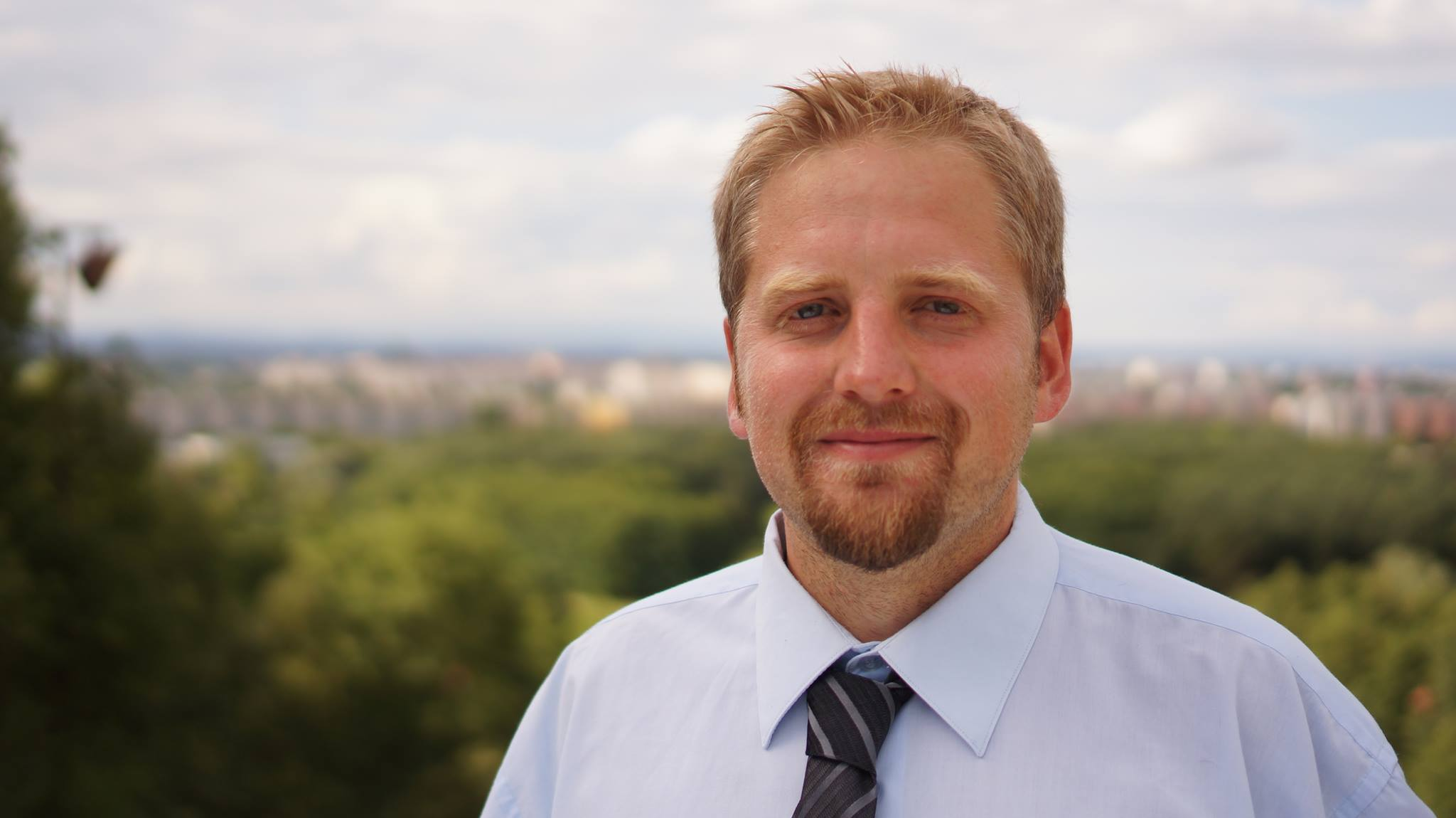 Vít Jedlička v Hradci Králové